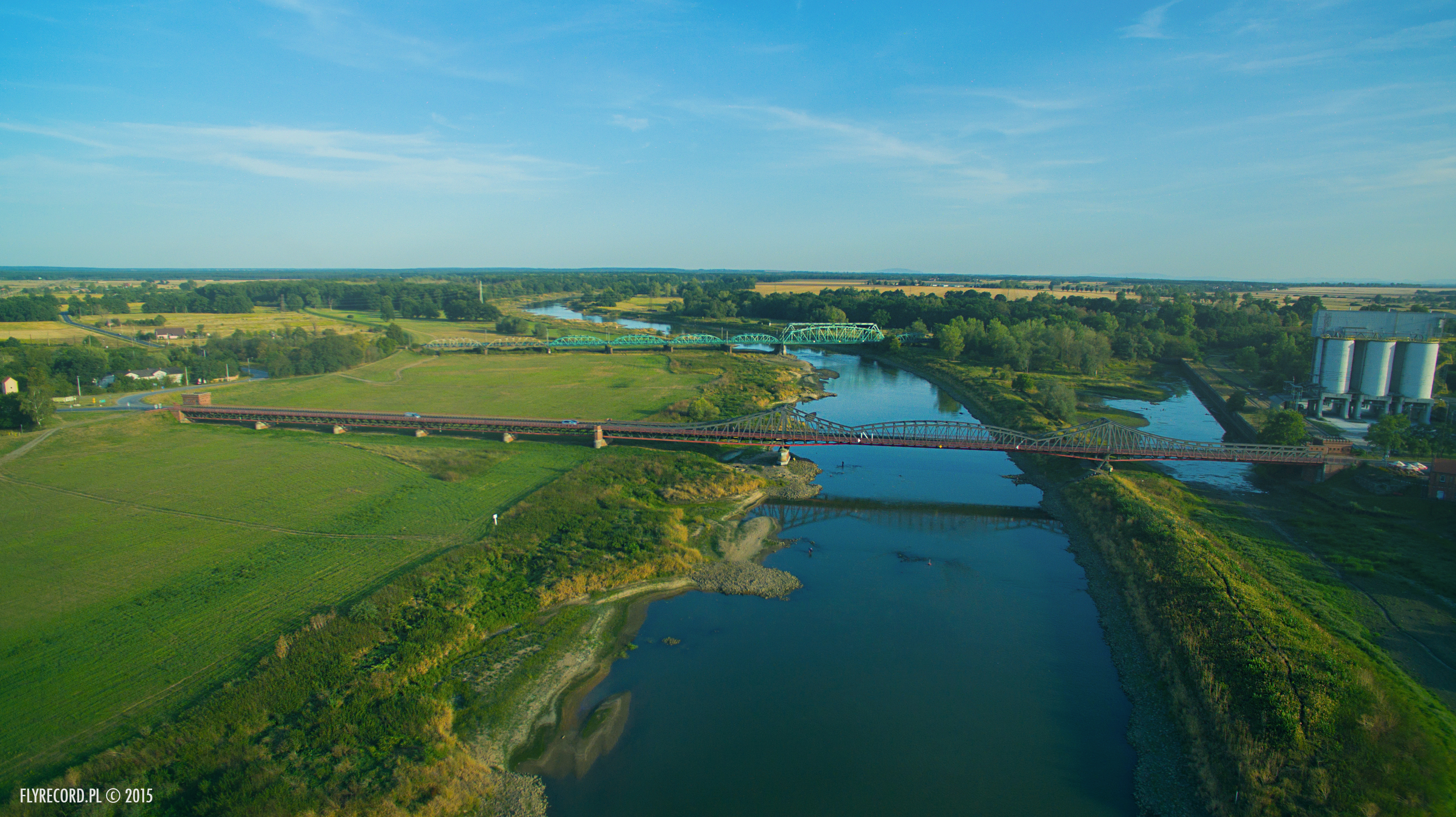 Panorama mostów w Ścinawie. Fotografia wykonana z wykorzystaniem drona przez flyrecord.pl